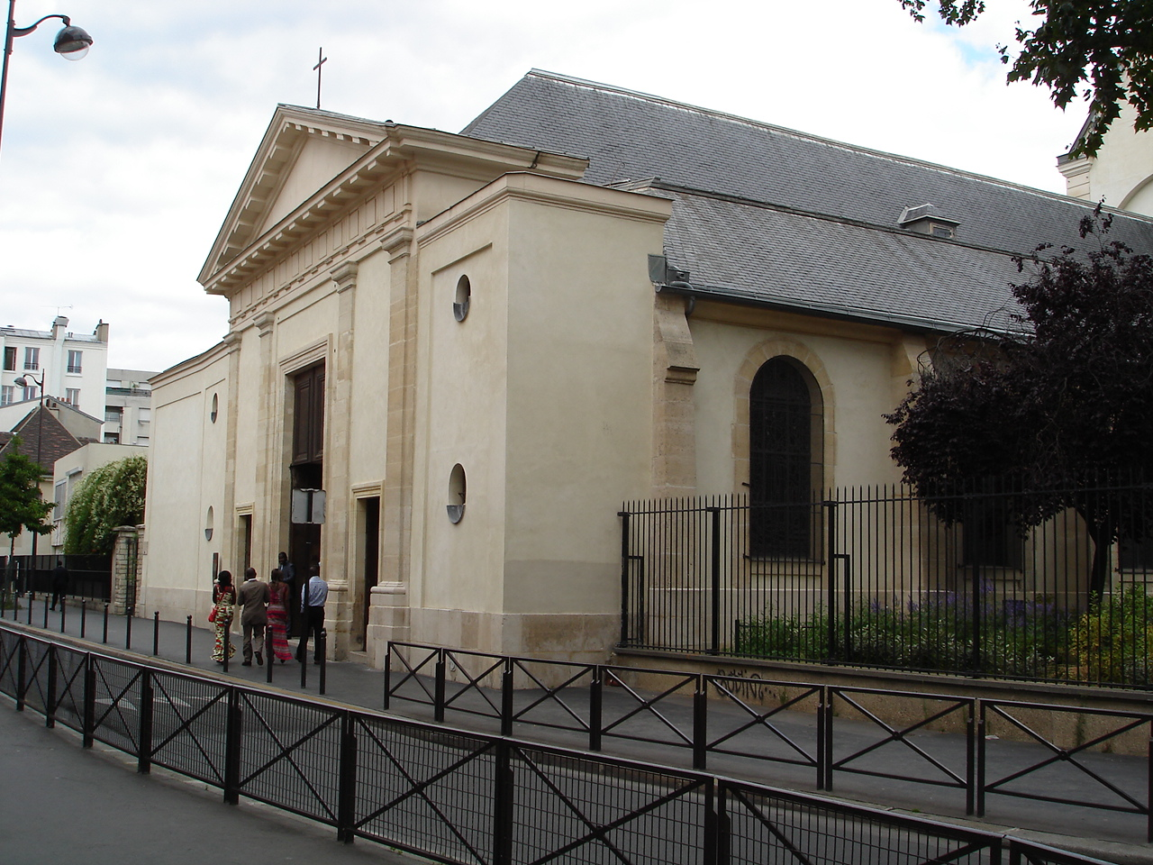 Église Sainte-Marguerite, rue Saint-Bernard (Paris XIe arrondissement).